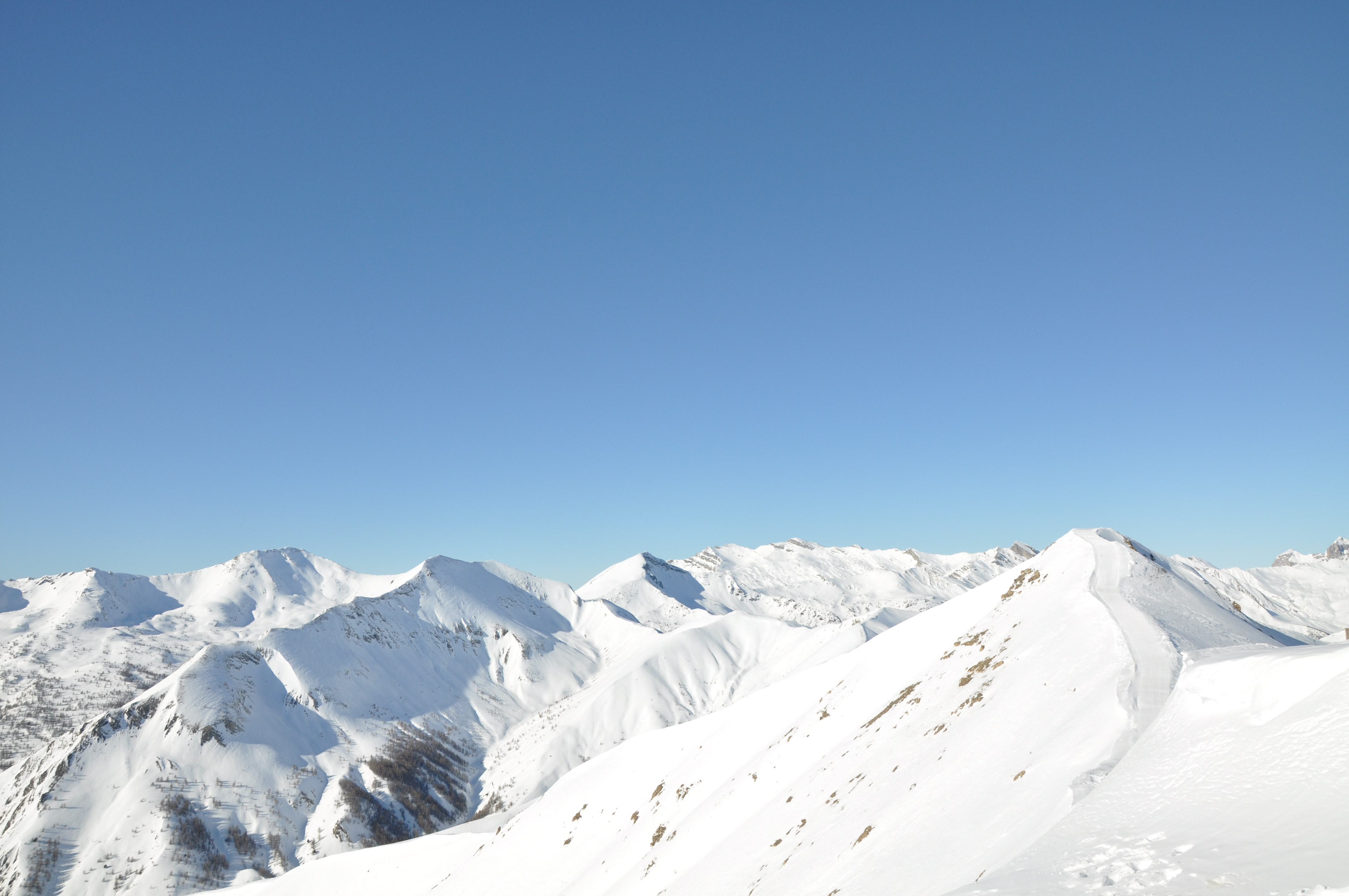 Le Seignus, montagnes